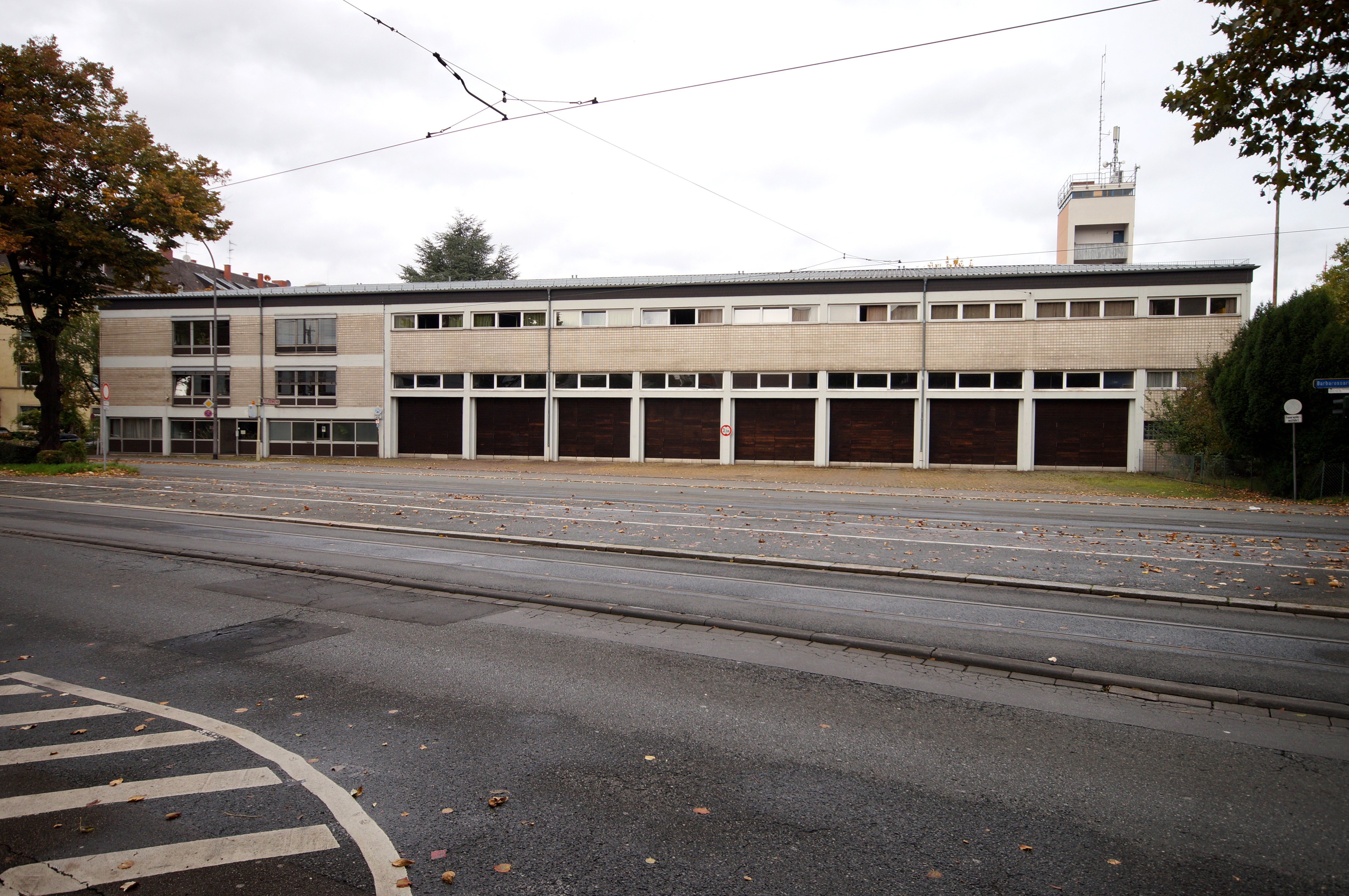 Die alte Feuerwache 2 der Berufsfeuerwehr Mainz im Barbarossaring 6 in Mainz-Neustadt; inzwischen niedergelegt.